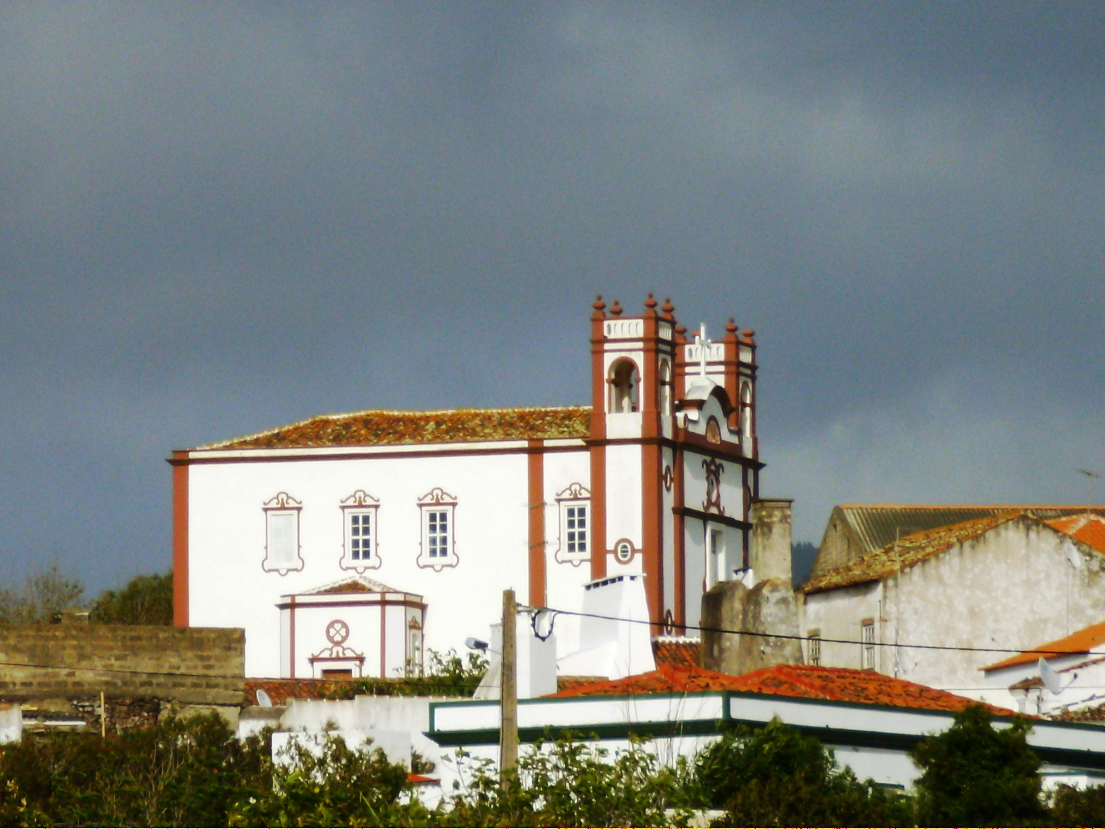 Igreja de Santo Antão, freguesia da Vila do Porto, concelho da Vila do Porto, ilha de Santa Maria, nos Açores.